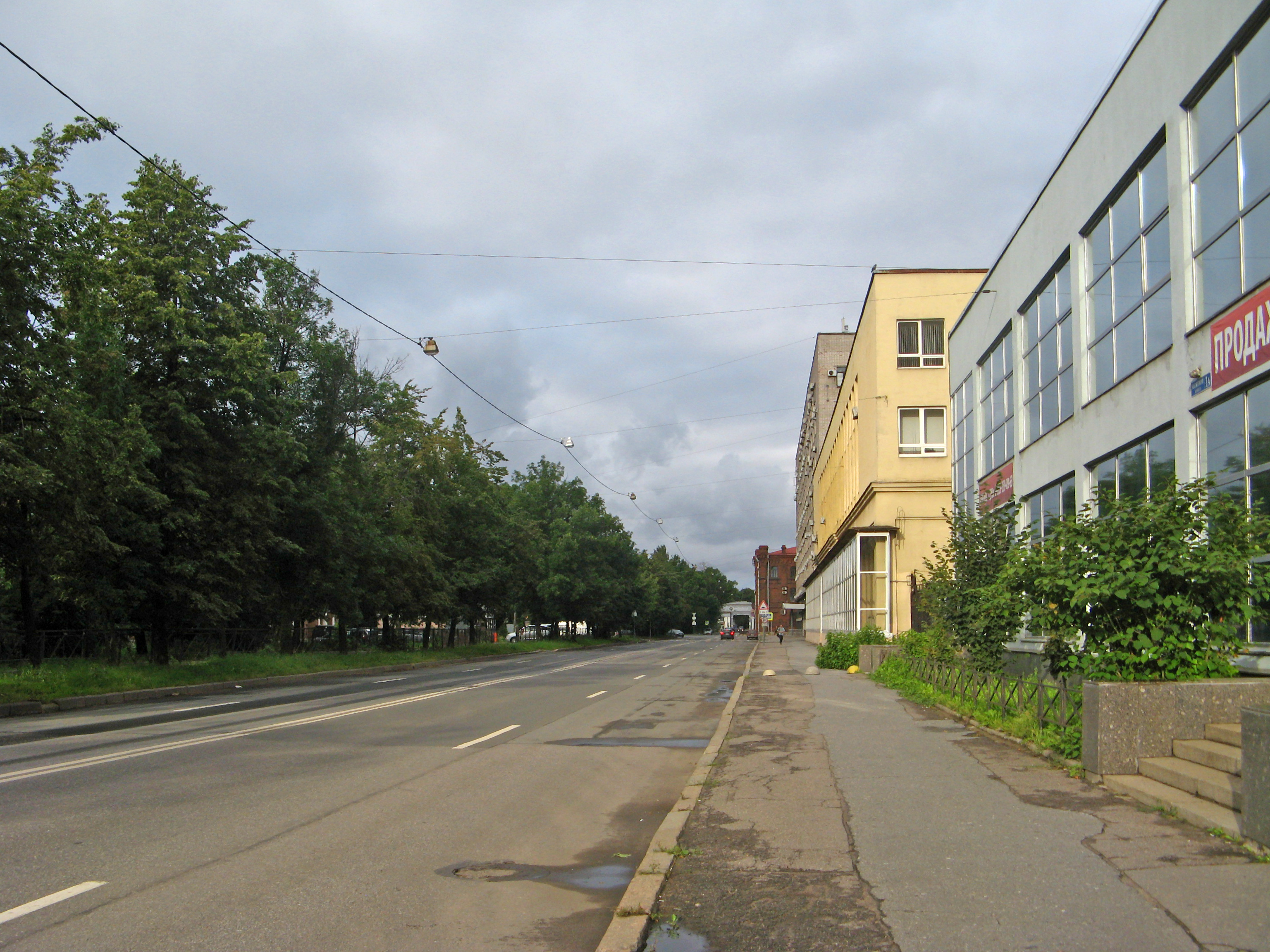 Межевой канал, Санкт-Петербург